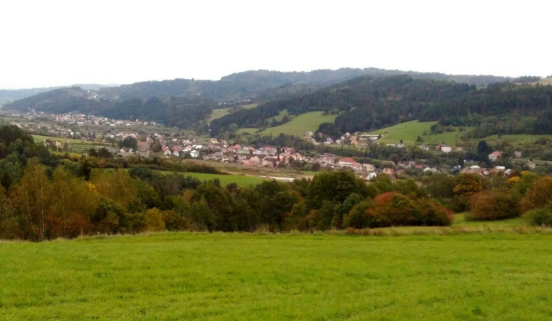 Centrálna časť obce Svrčinovec, pohľad zo západu. V pozadí severné výbežky Javorského Beskydu (vpravo) a Jablunkovské medzihorie (vľavo). Na ľavom okraji obrázka v pozadí je časť obce Čierne.